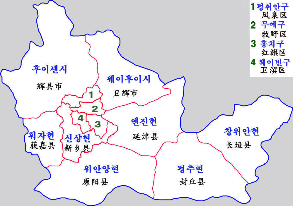 신샹시 현급구역도